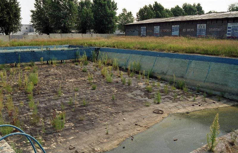 11.-18.8.1991 Bundesland Sachsen-Anhalt Bei Stendal, Gelände der ehemaligen sowjetischen Streitkräfte